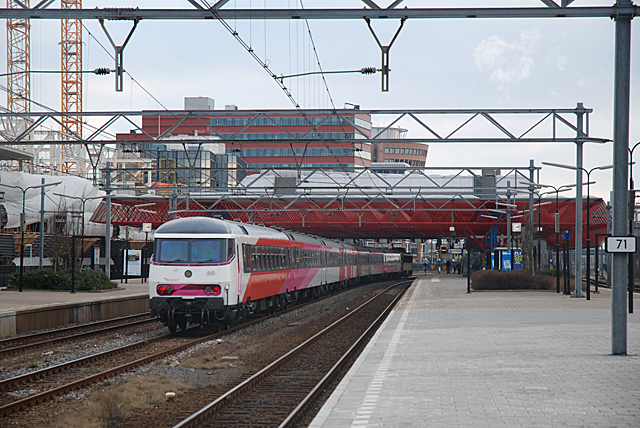 Beneluxstam te Zaandam, tijdens een proefrit.